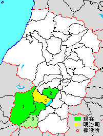 Map of Nishiokitama District, Yamagata, Japan